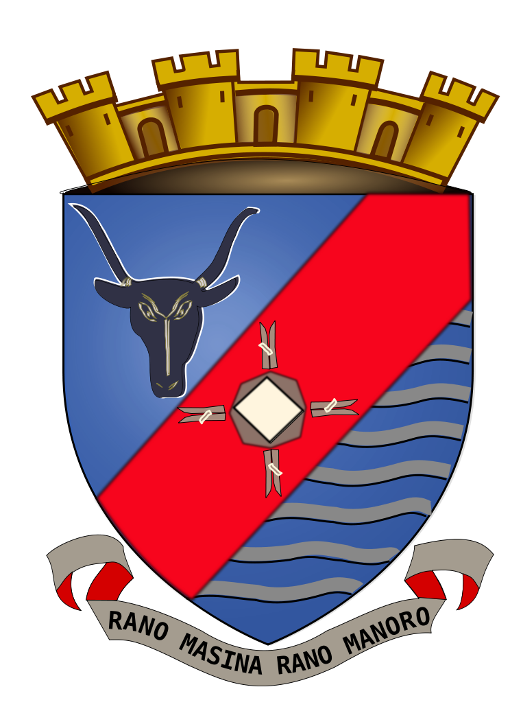 Blason d'Antsirabe